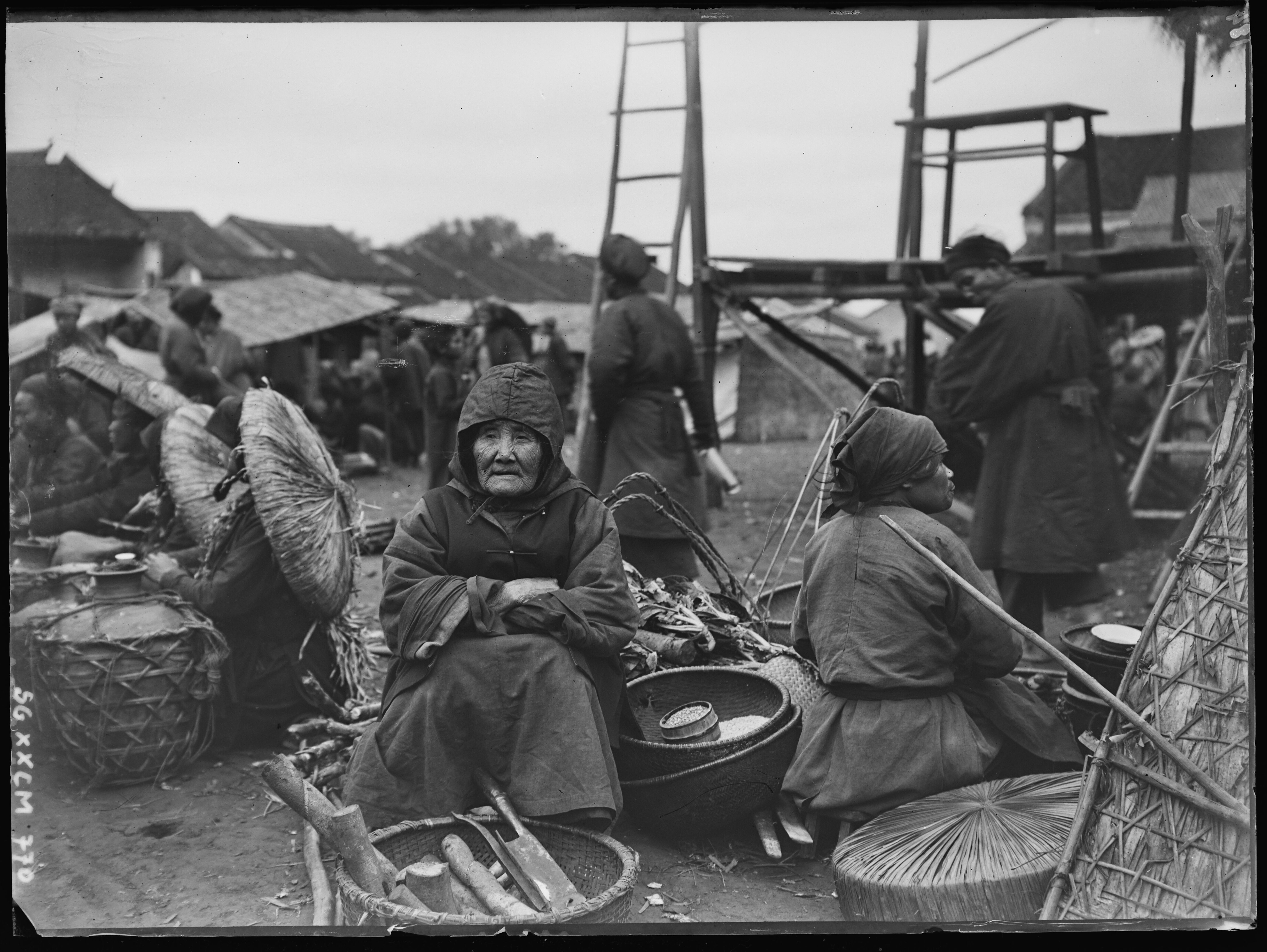 Tonkin. Kilua, vieille marchande Tho